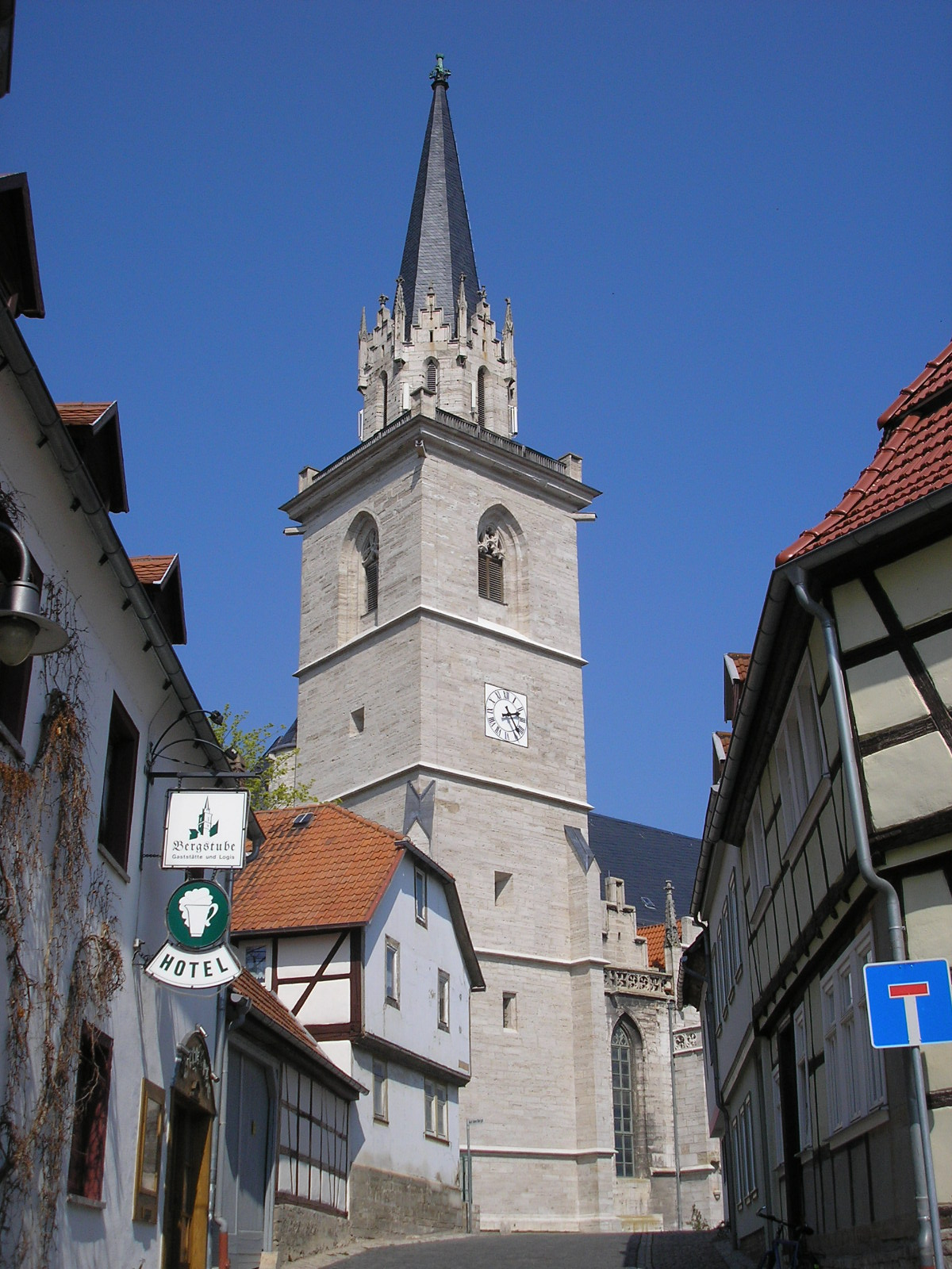 Die Bergkirche in Bad Langensalza (Thüringen).